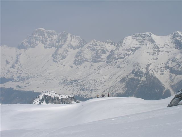 Il montasio dal Canin. Foto scattata durante un'escursione fuoripista Pasqua 2006.